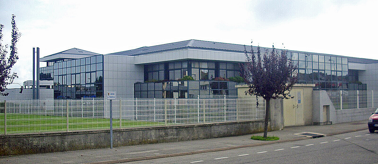 Immeuble de bureaux dans la zone d'activité des Terrasses, à Equeurdreville-Hainneville, regroupant des filliales d'Areva (SGN, Euriware ...)